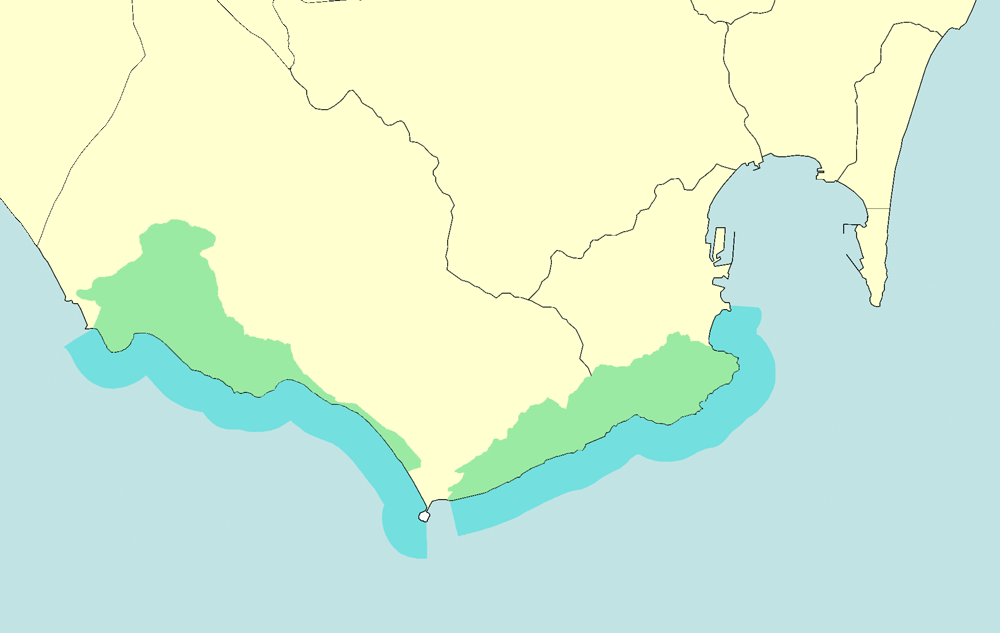 Mapa de situación del Parque natural del Estrecho, Andalucía, España